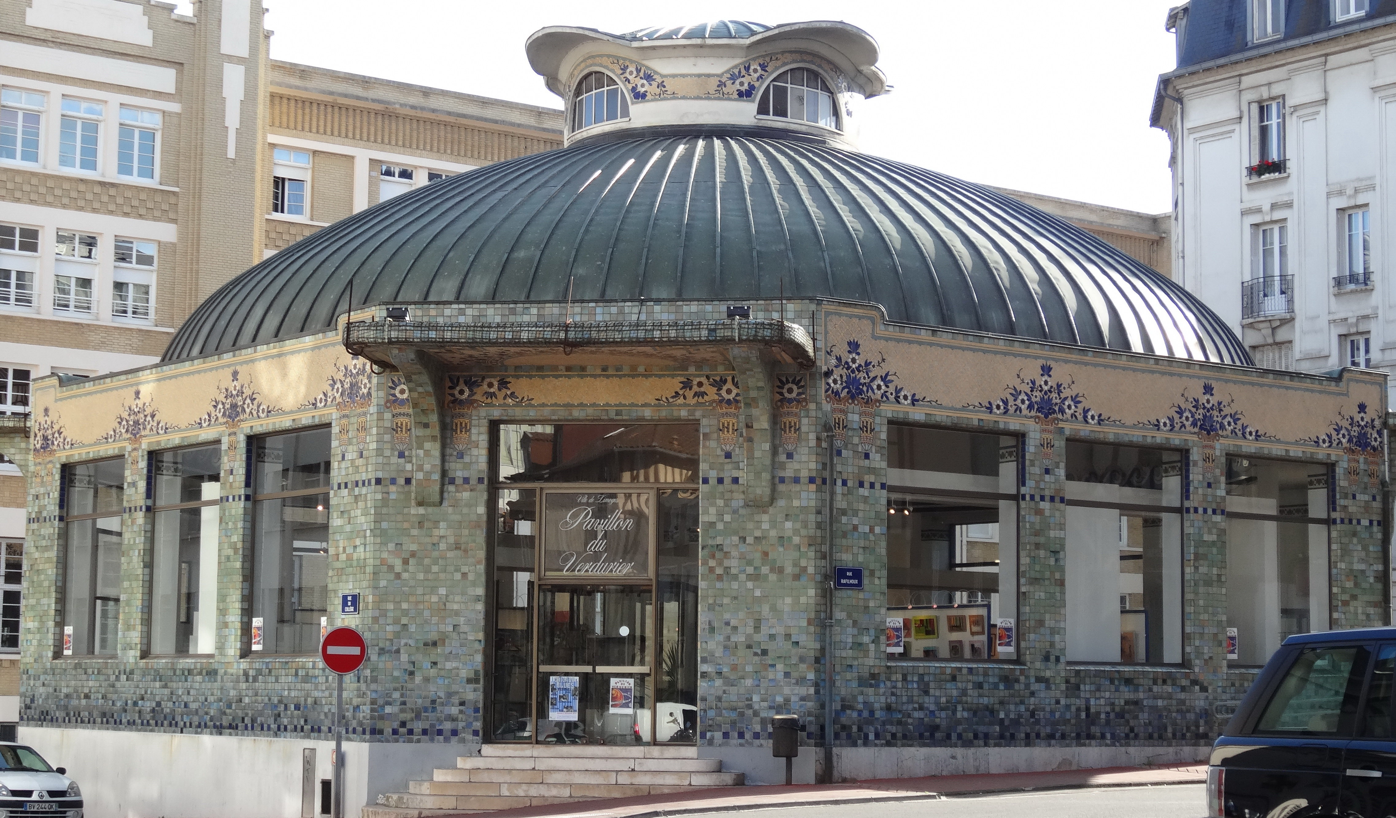 Pavillon du Verdurier - Limoges